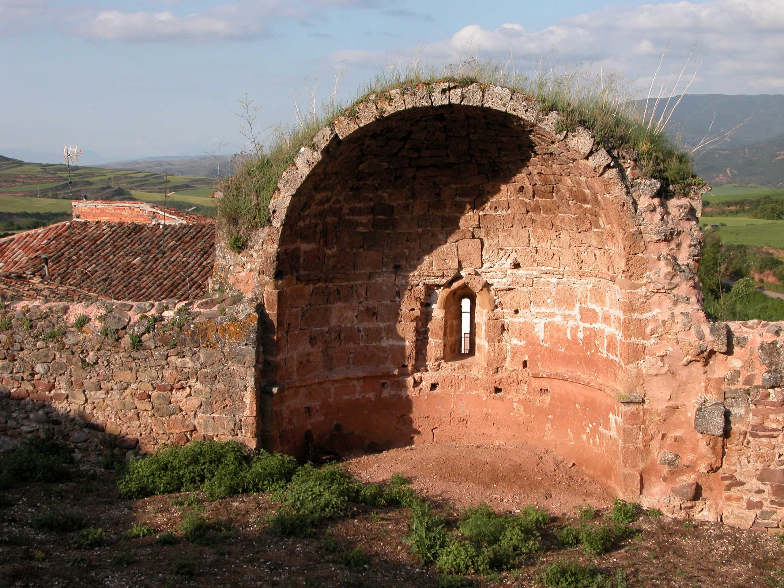 Ruinas de la ermita de San Miguel en Matute, La Rioja - España.